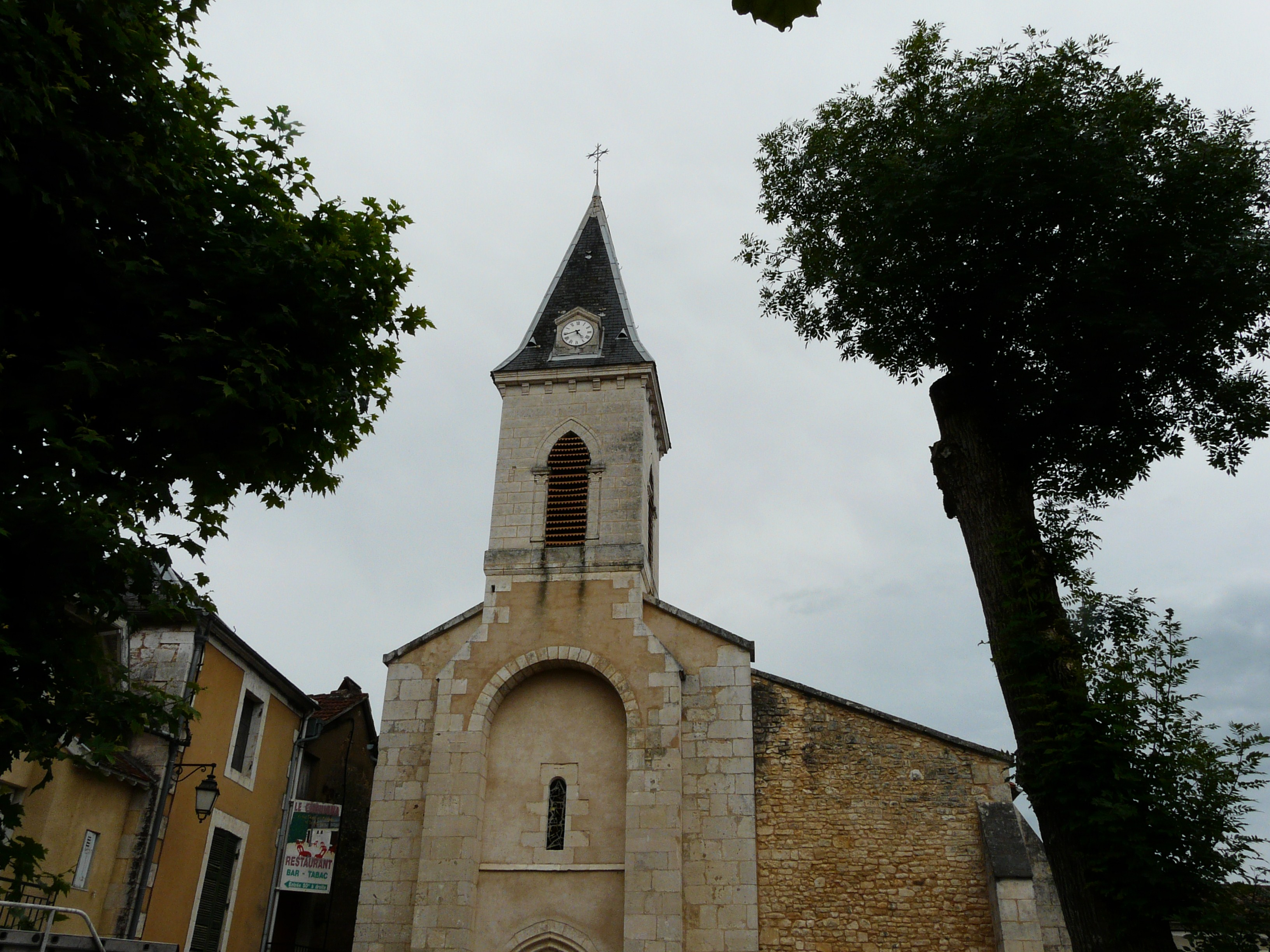 L'église Saint-Martin, Savignac-les-Églises, Dordogne, France